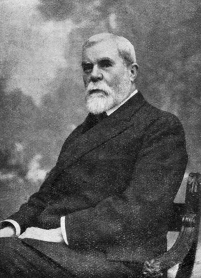 Lucien Gallois, (1857-1941) est un géographe français.